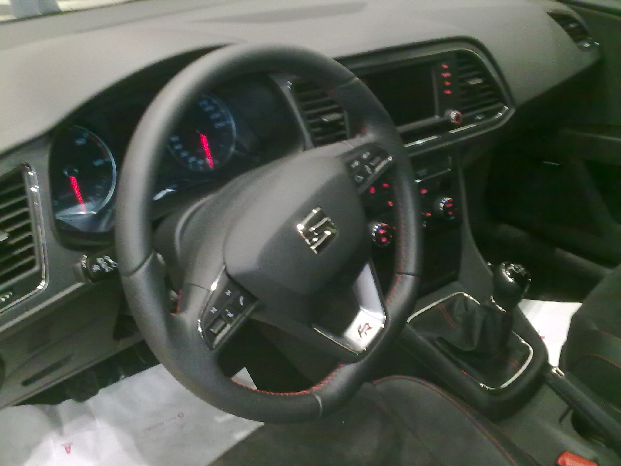 Imagen realizada con movil de este modelo